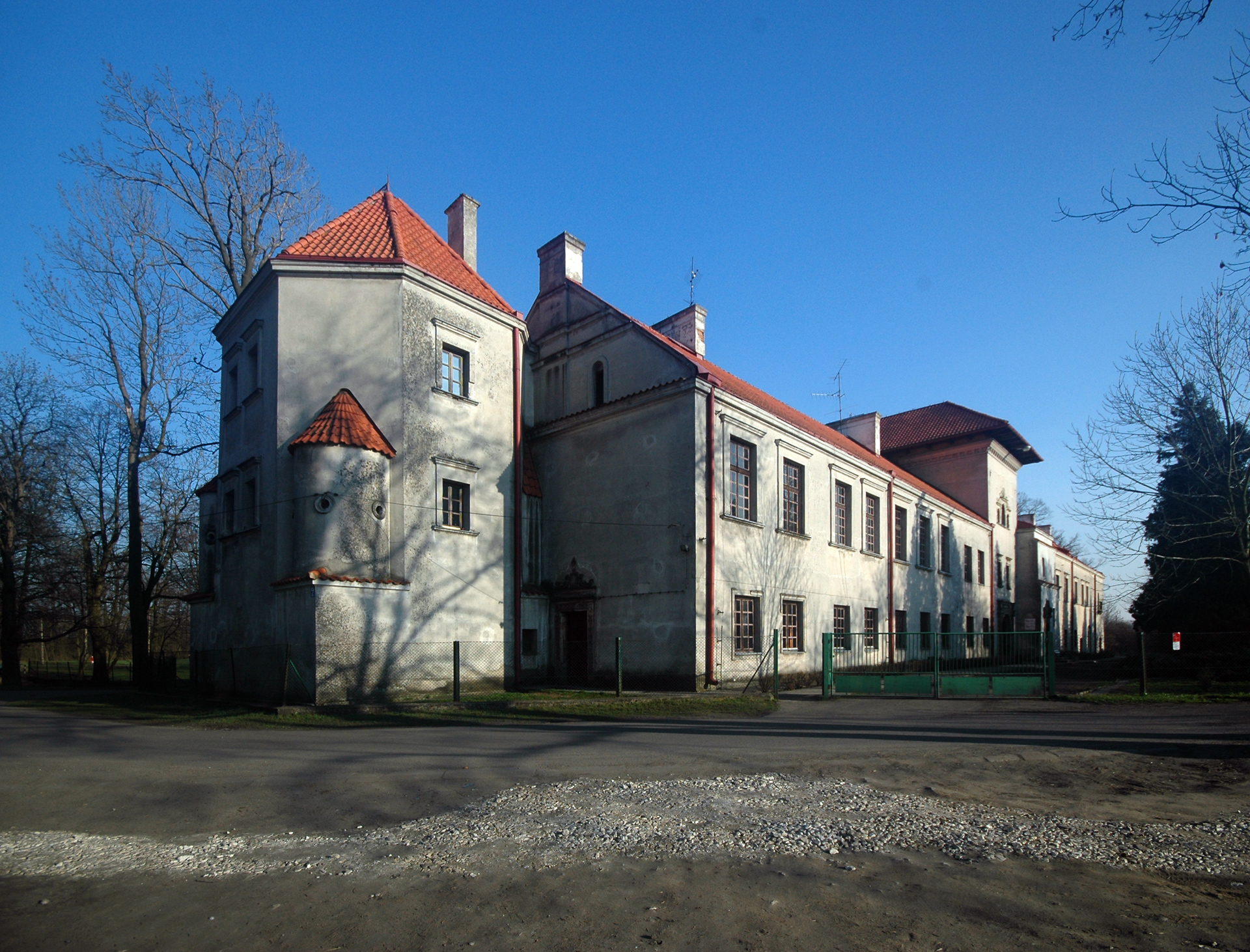 zespół zamkowy - zamek Piotrków Tryb. - Byki, ul. Kasztelańska 9, Piotrków Tryb. 05.1947.